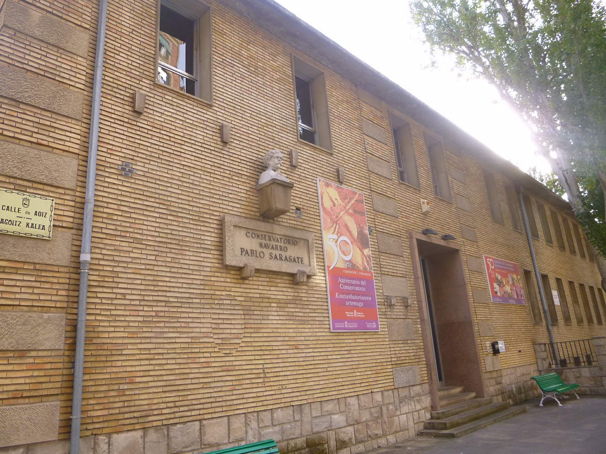 Antiguo Conservatorio Navarro Pablo Sarasate (Pamplona